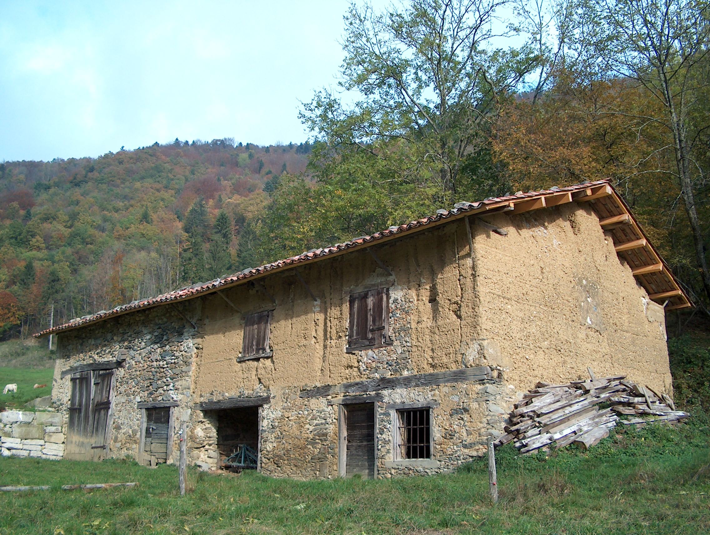 La grange du lieu-dit de Bassey Saint-Nicolas-de-Macherin Isère, Rhône-Alpes, France Novembre 2004